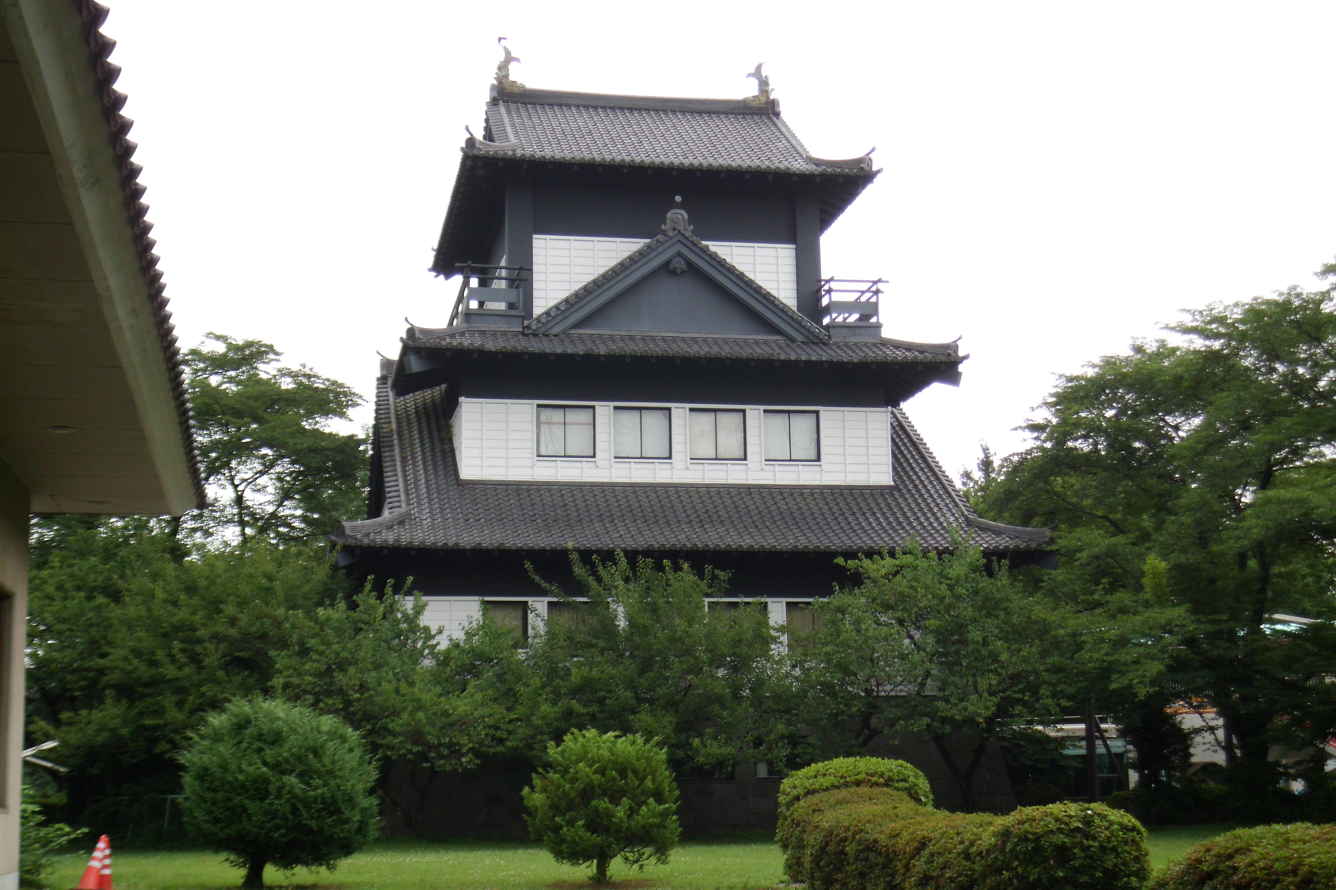 宇都宮動物園内にある模擬天守の宇都宮城